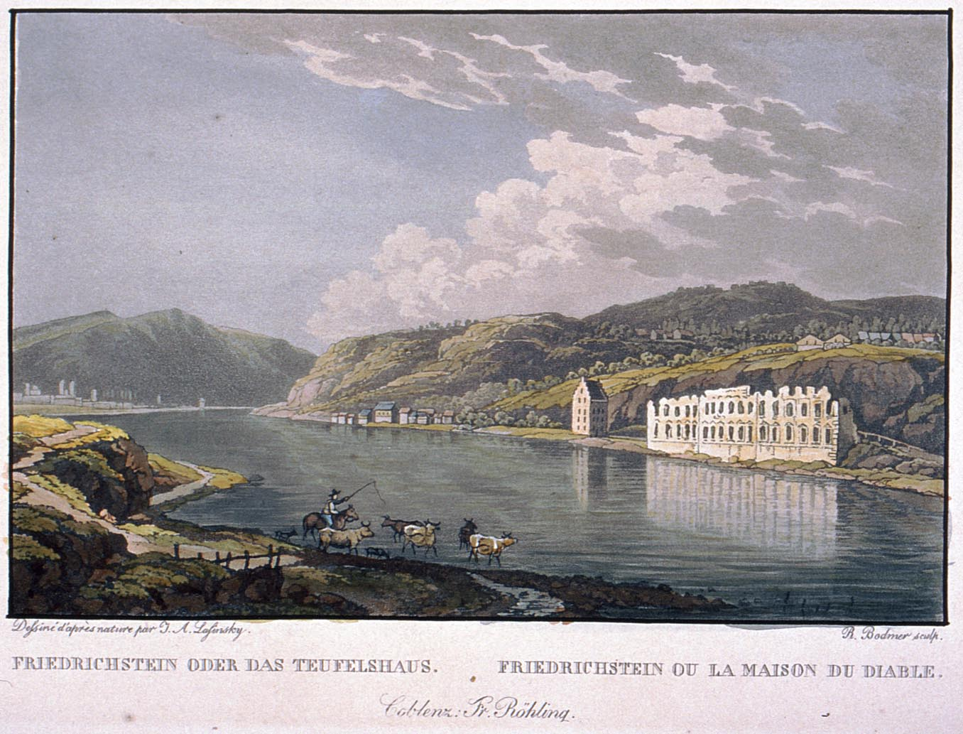 Altkolorierter Aquatintastich von R.Bodmer nach Vorlage von J.A. Lasinsky